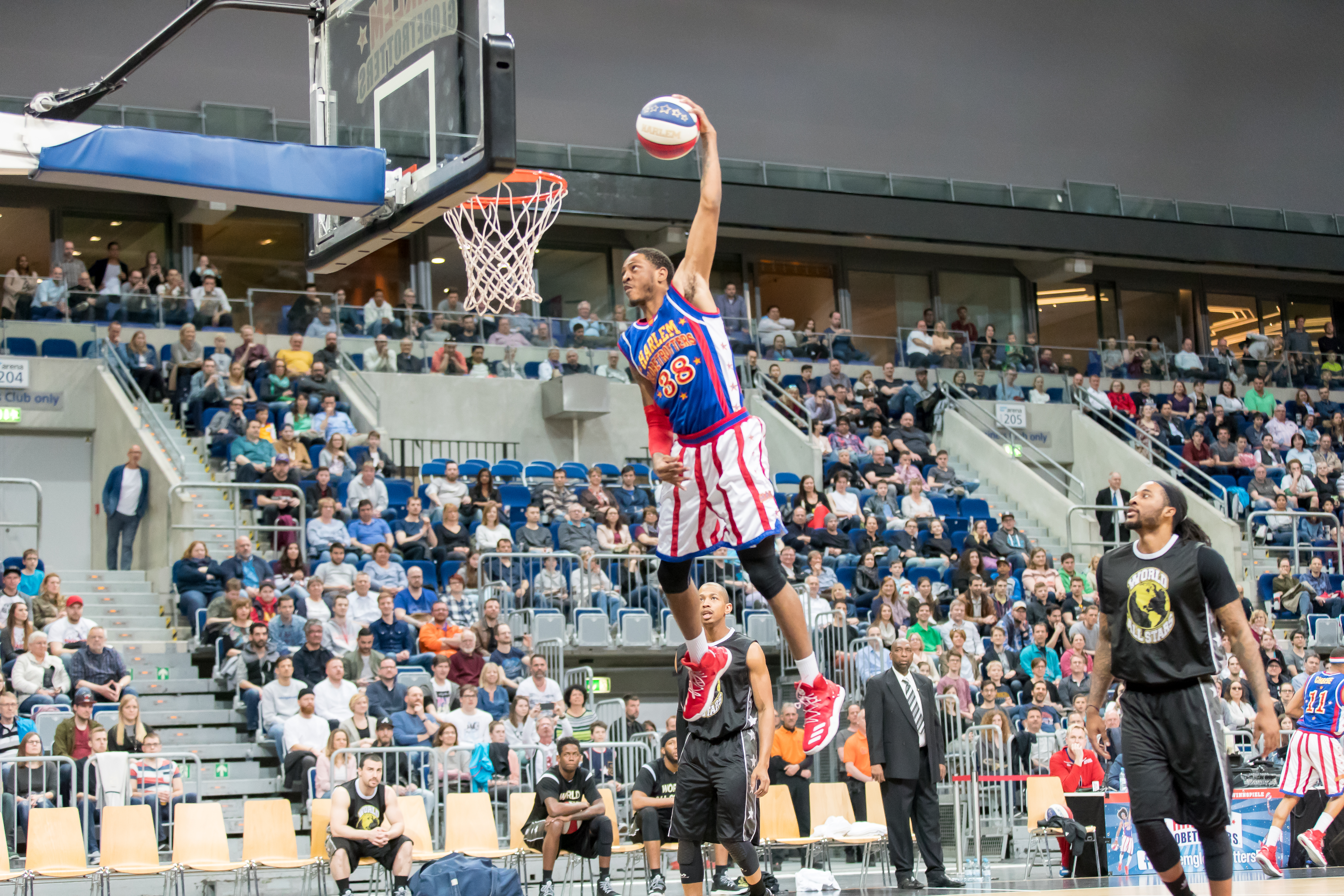 Harlem Globetrotters during Harlem Globetrotters at SAP Arena, Mannheim, Baden-Württemberg, Germany on 2017-03-27, Photo: Sven Mandel